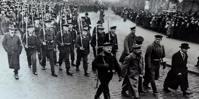 Trauerzug für acht getötete Revolutionäre in Berlin